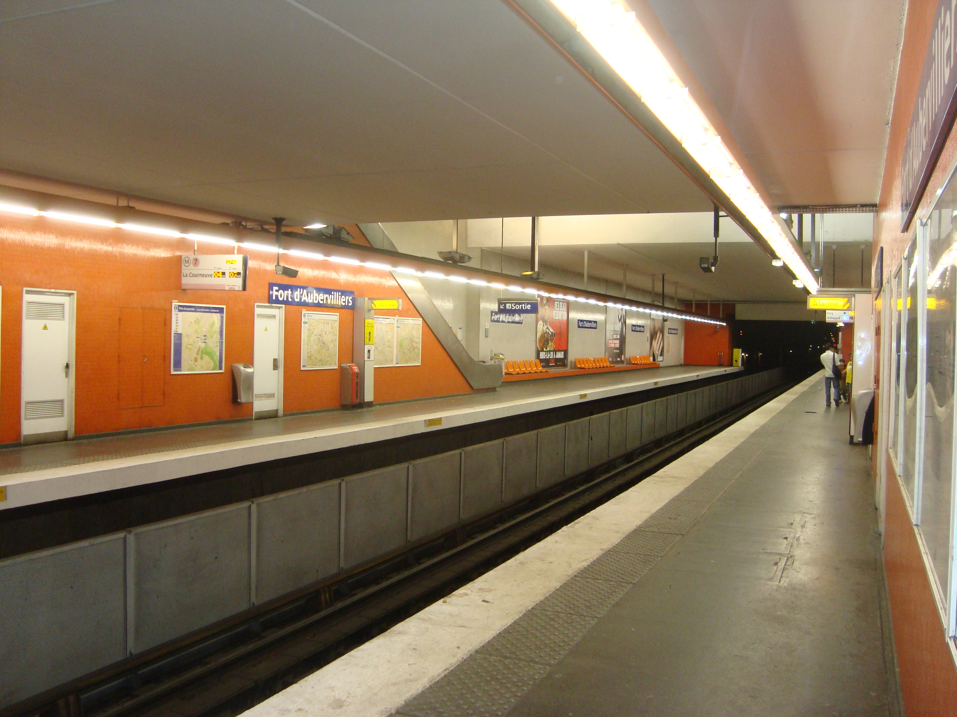 Vue des quais de la station de métro Fort d'Aubervilliers sur la ligne 7. Photo prise du quai direction Ivry-Villejuif.